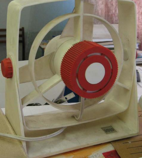 Вентилятор "Эфир"